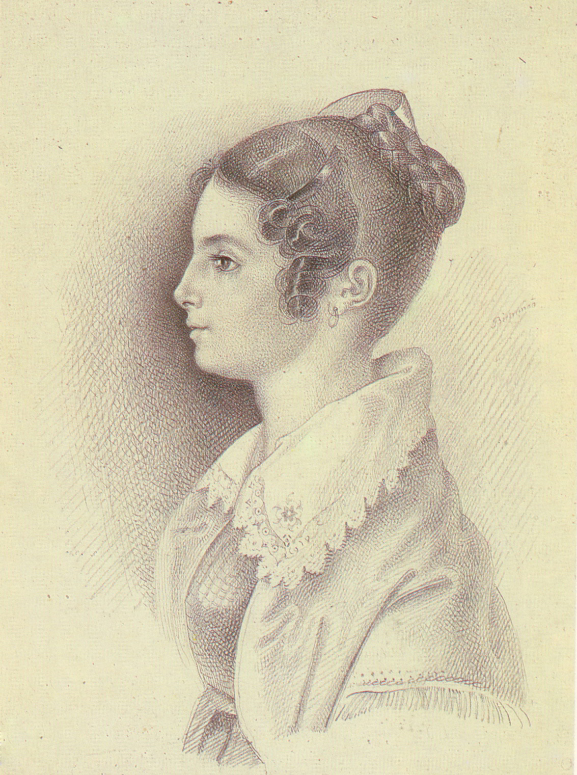 Княгиня Вера Федоровна Вяземская, урожденная Гагарина (1790-1886), дочь Прасковьи Юрьевны Гагариной, рожденной Трубецкой, и Федора Сергеевича Гагарина. Жена П.А. Вяземского.